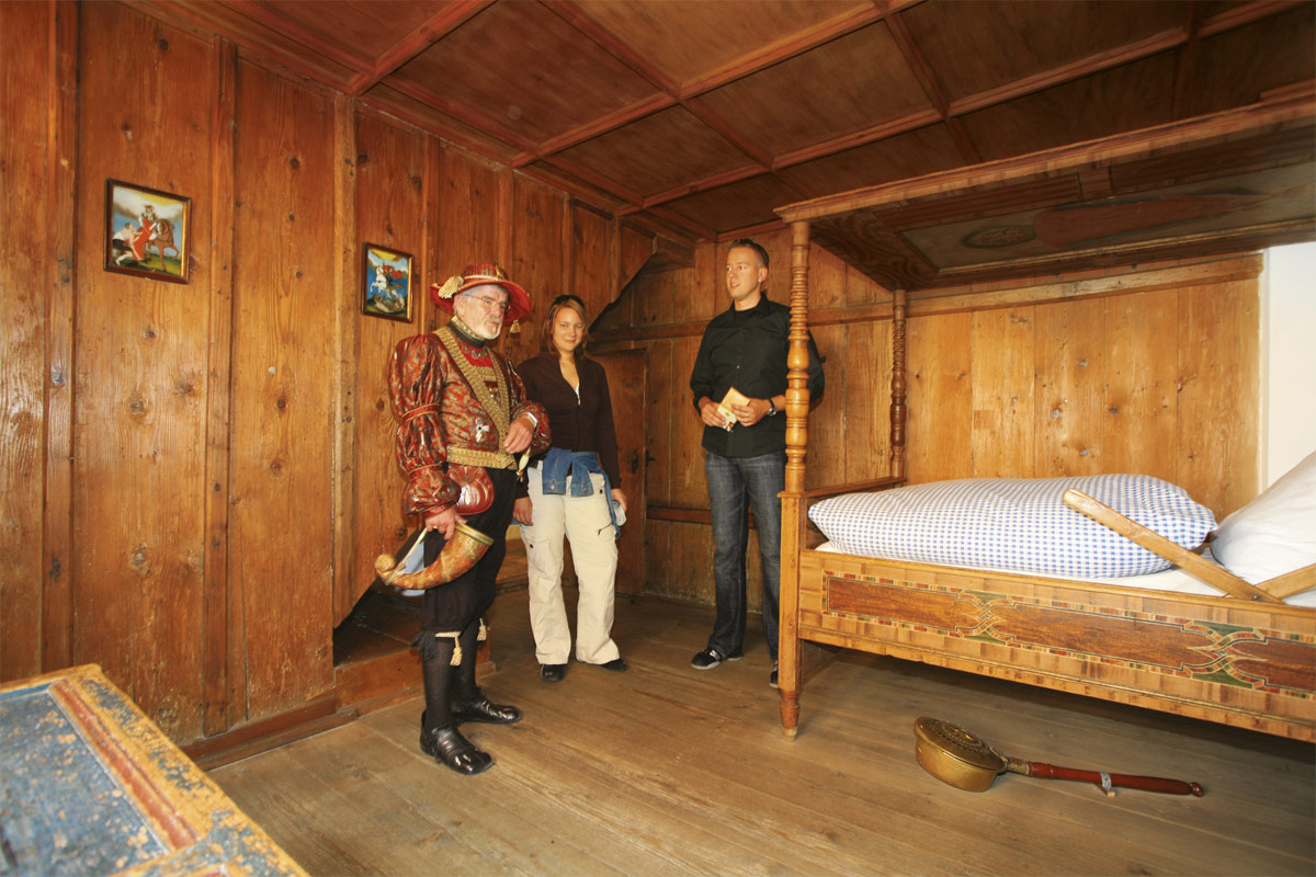 Schlafstube im Fuggereimuseum